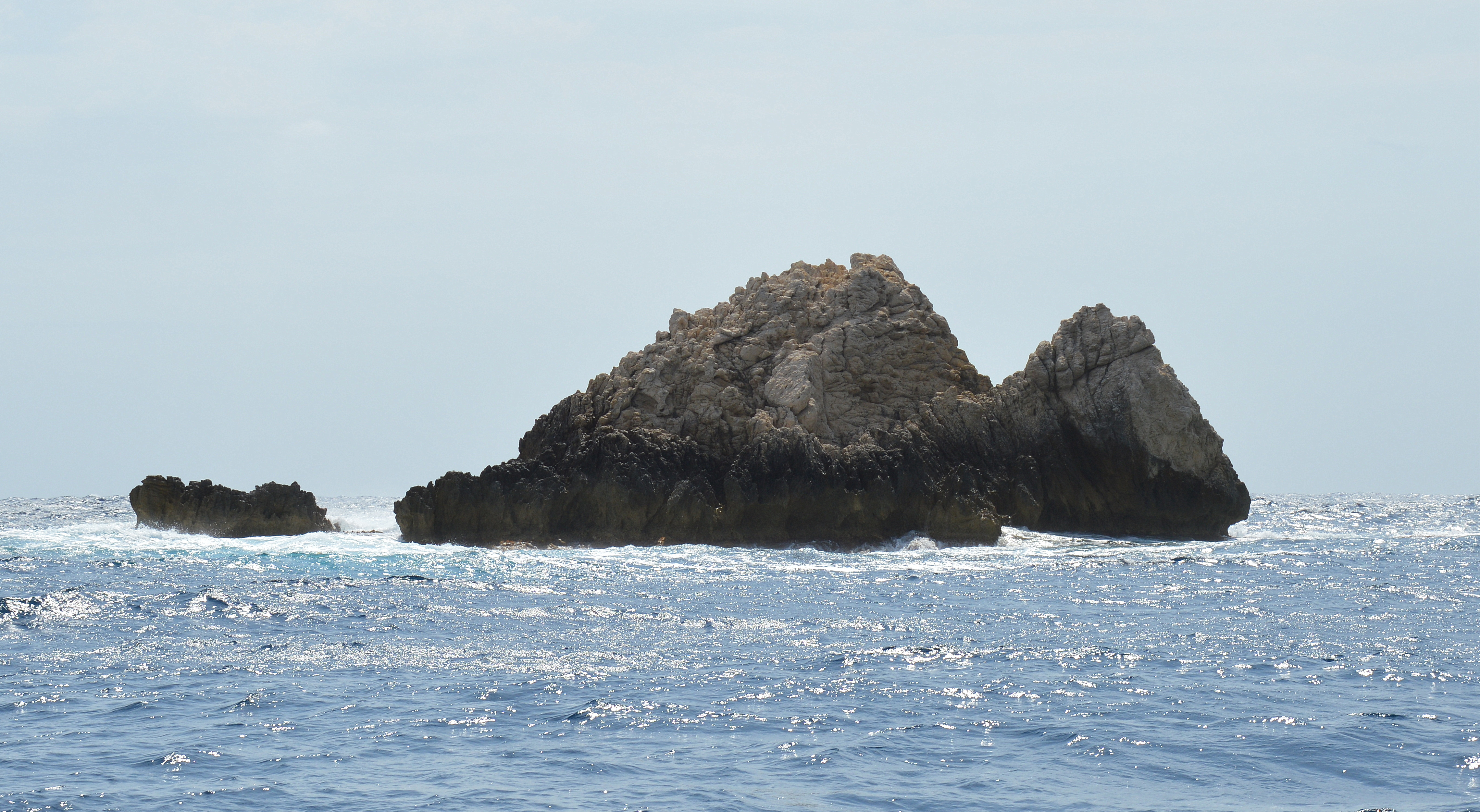 Insel Farallo de Cala Gat